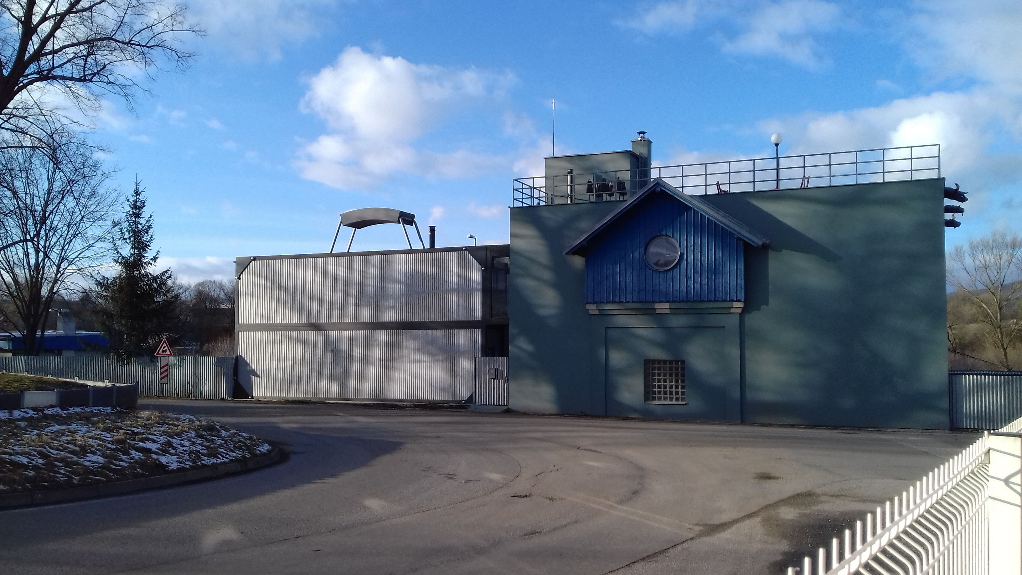 Kovový dům v podobě kufru postavil na nádraží v Kájově u Českého Krumlova sochař Miroslav Páral. Kufr je podle něj symbolem útěku, deportací, ale i zážitků, které se při otevření vrací. Dům je dlouhý 12 metrů, šest vysoký a 3,6 metru široký. Zdroj